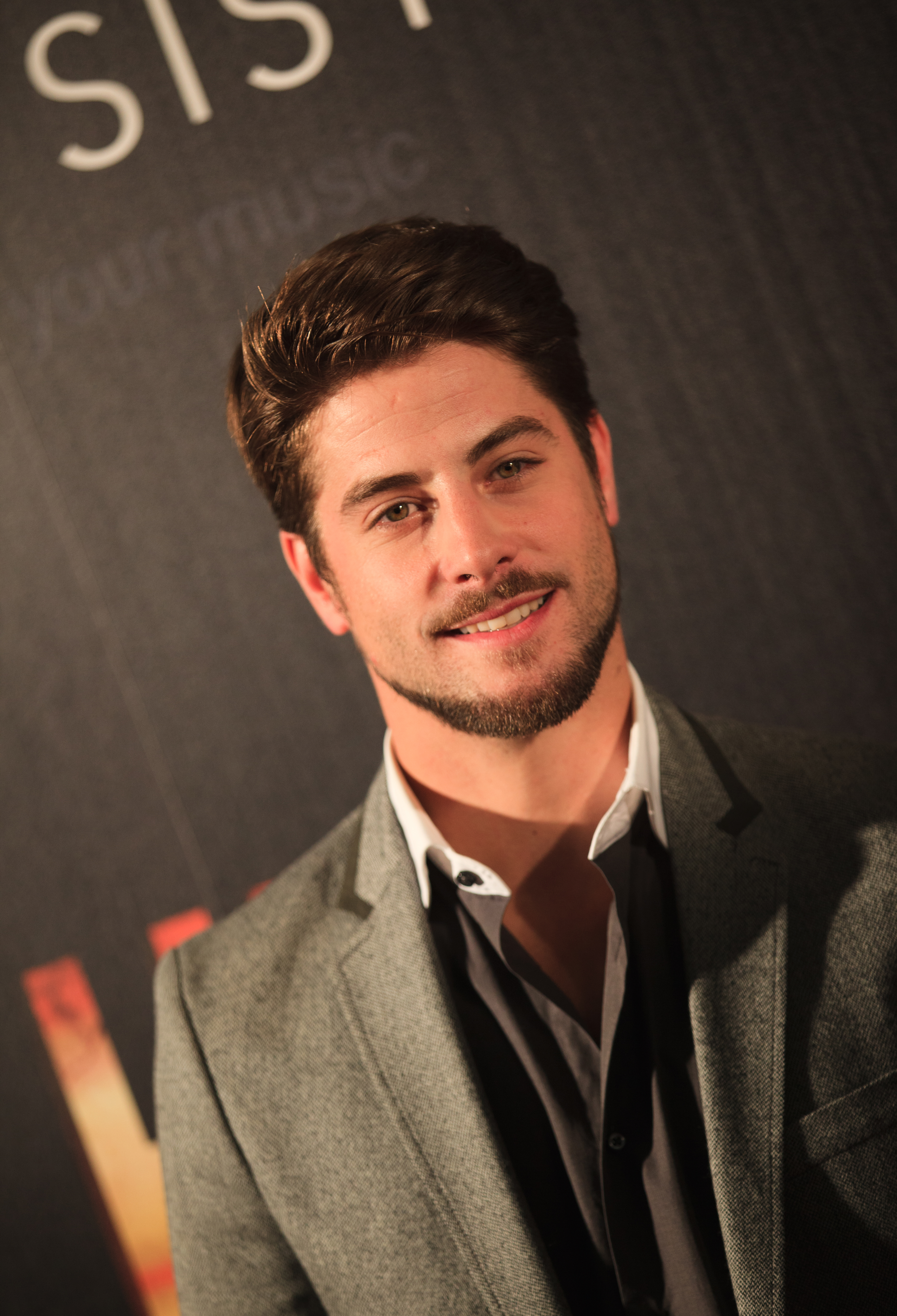 Luís Fernandez Perla en el preestreno de La Huida